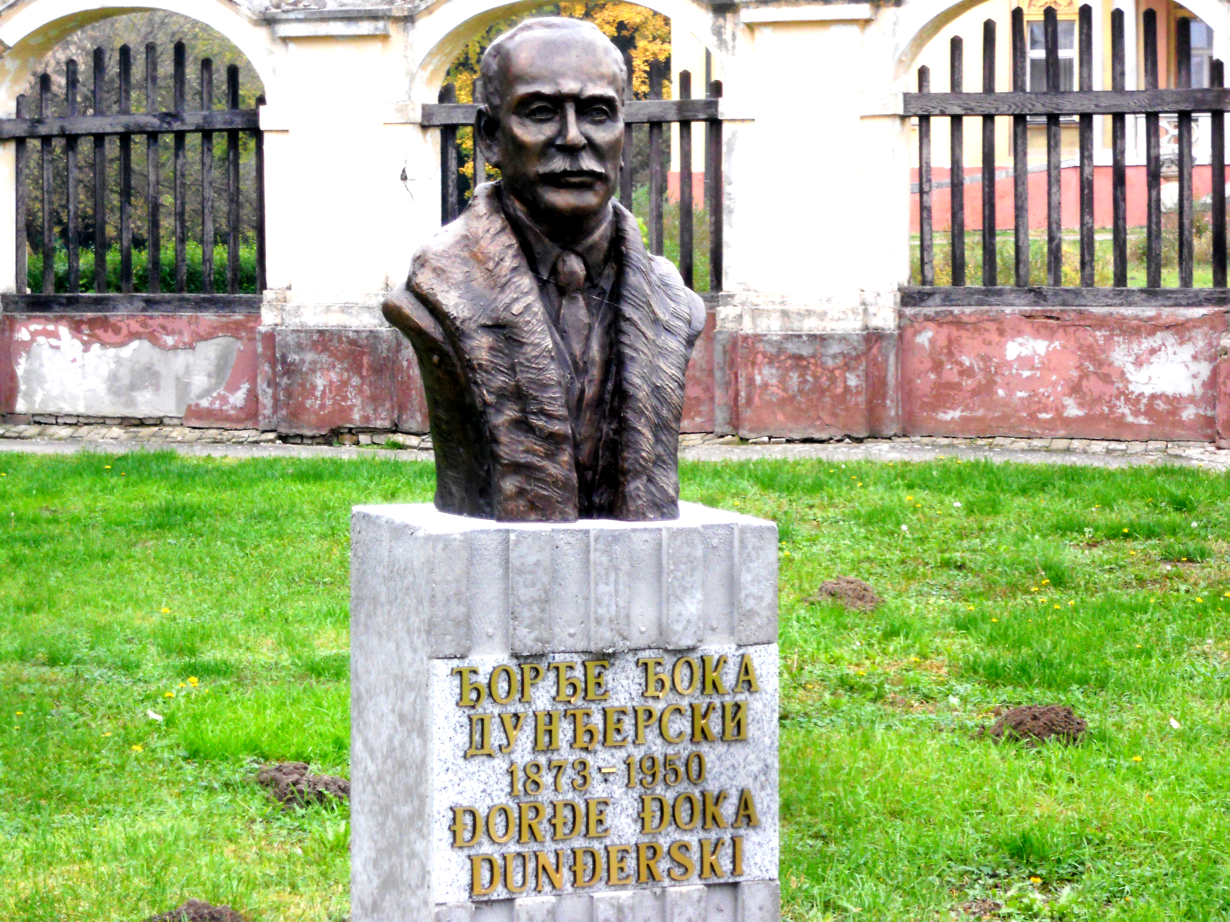 Srpski (latinica): Bista Đorđa Dunđerski iz Kulpina